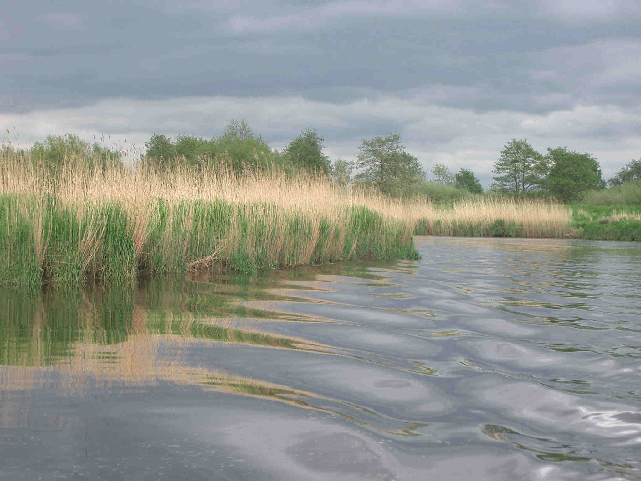 Schilfgürtel an der Oste Eig. Aufn. 2004 gemeinfrei